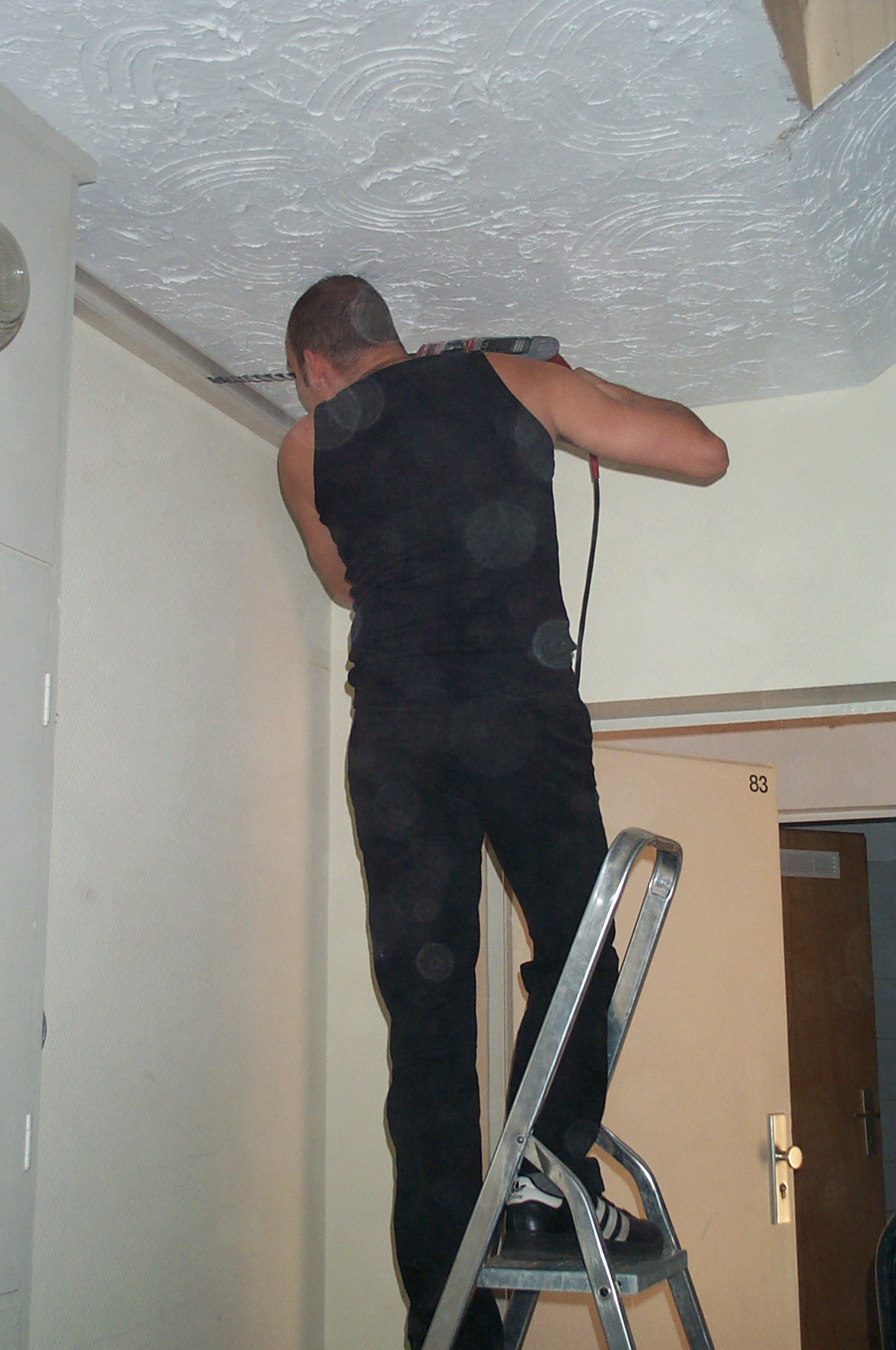 Studenten der Forschungsgemeinschaft elektronische Medien e.V. legen Kabel für das FeM-Net